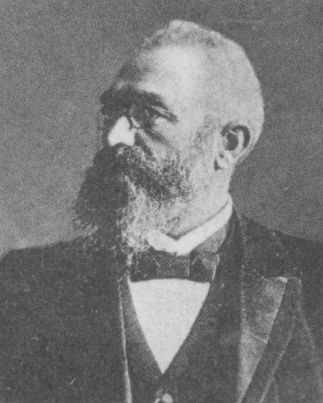 Foto von Jan Frers Martens Fegter